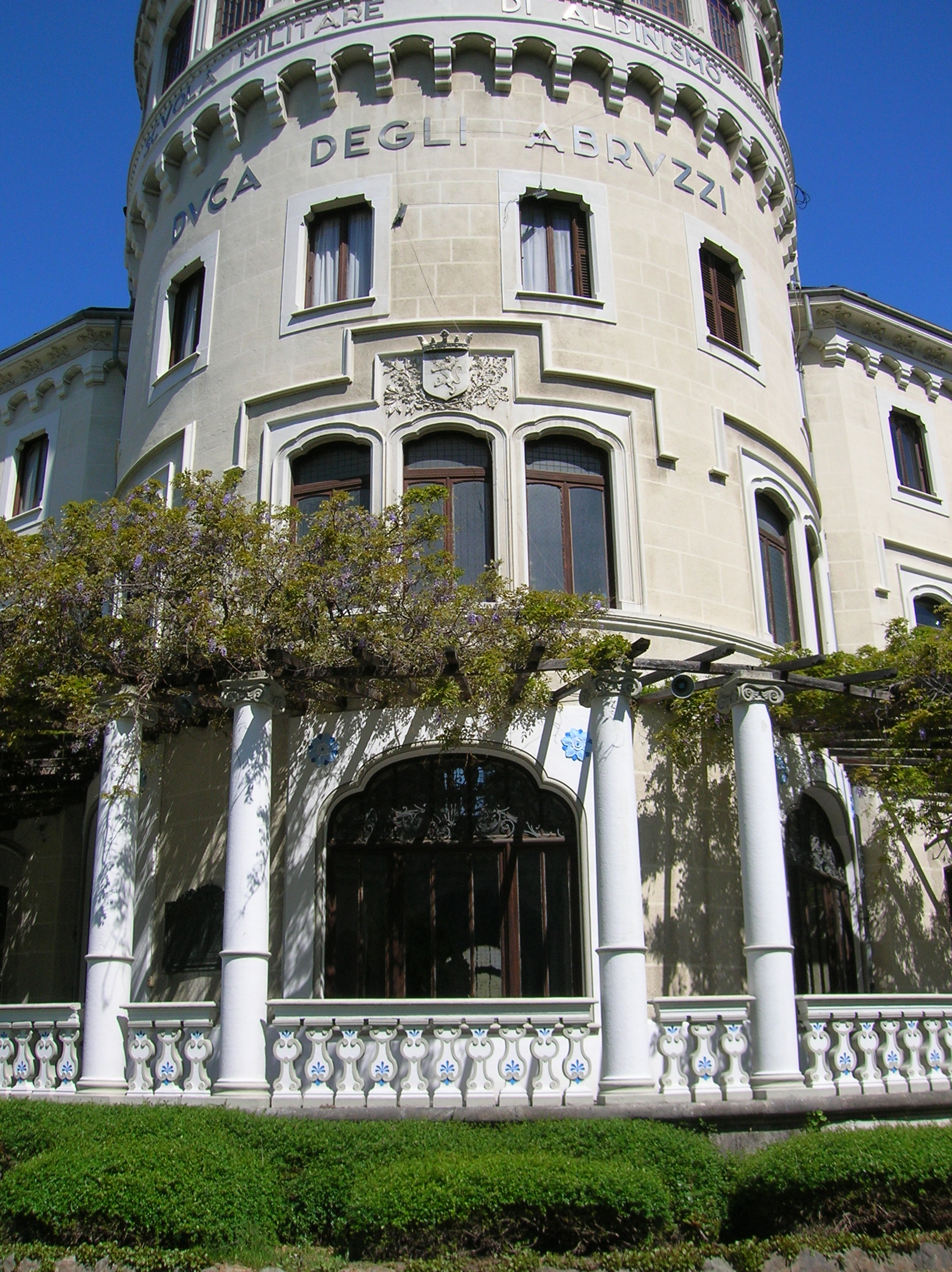 Facciata del Castello Jocteau, Aosta, Valle d'Aosta, Italia. Il castello di solito non è visitabile: apertura straordinaria in occasione delle Caserme aperte al pubblico per il 151° anniversario dell'Esercito italiano.